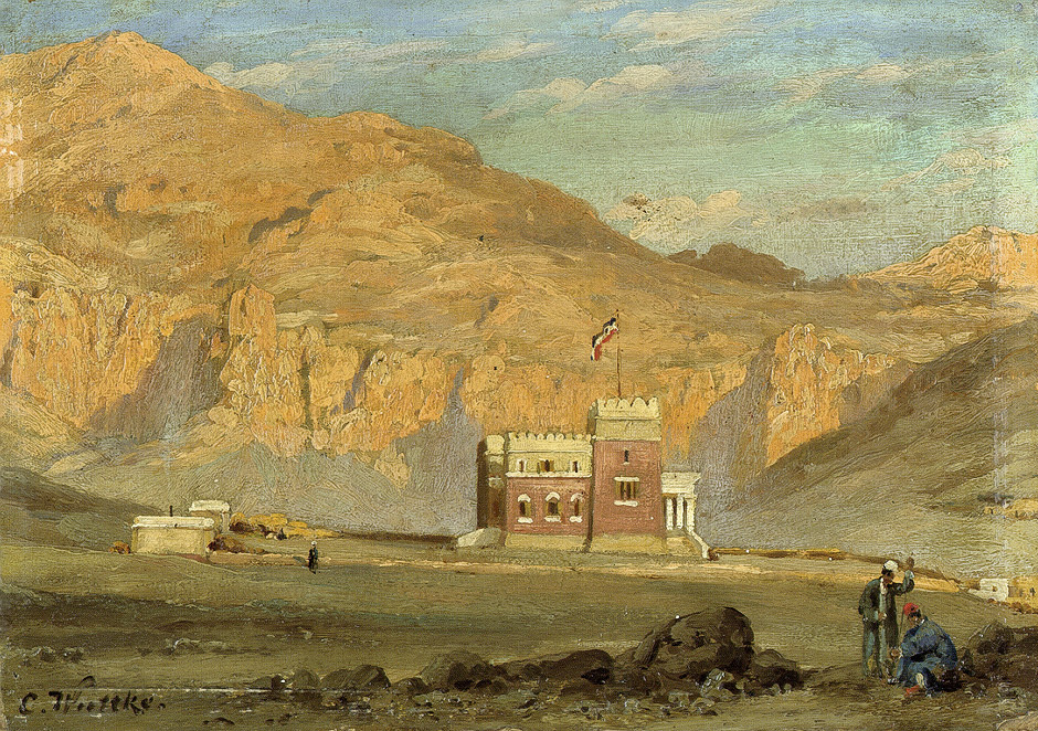 Ansicht des Deutschen Hauses in Thebentitle QS:P1476,de:"Ansicht des Deutschen Hauses in Theben" label QS:Lde,"Ansicht des Deutschen Hauses in Theben"